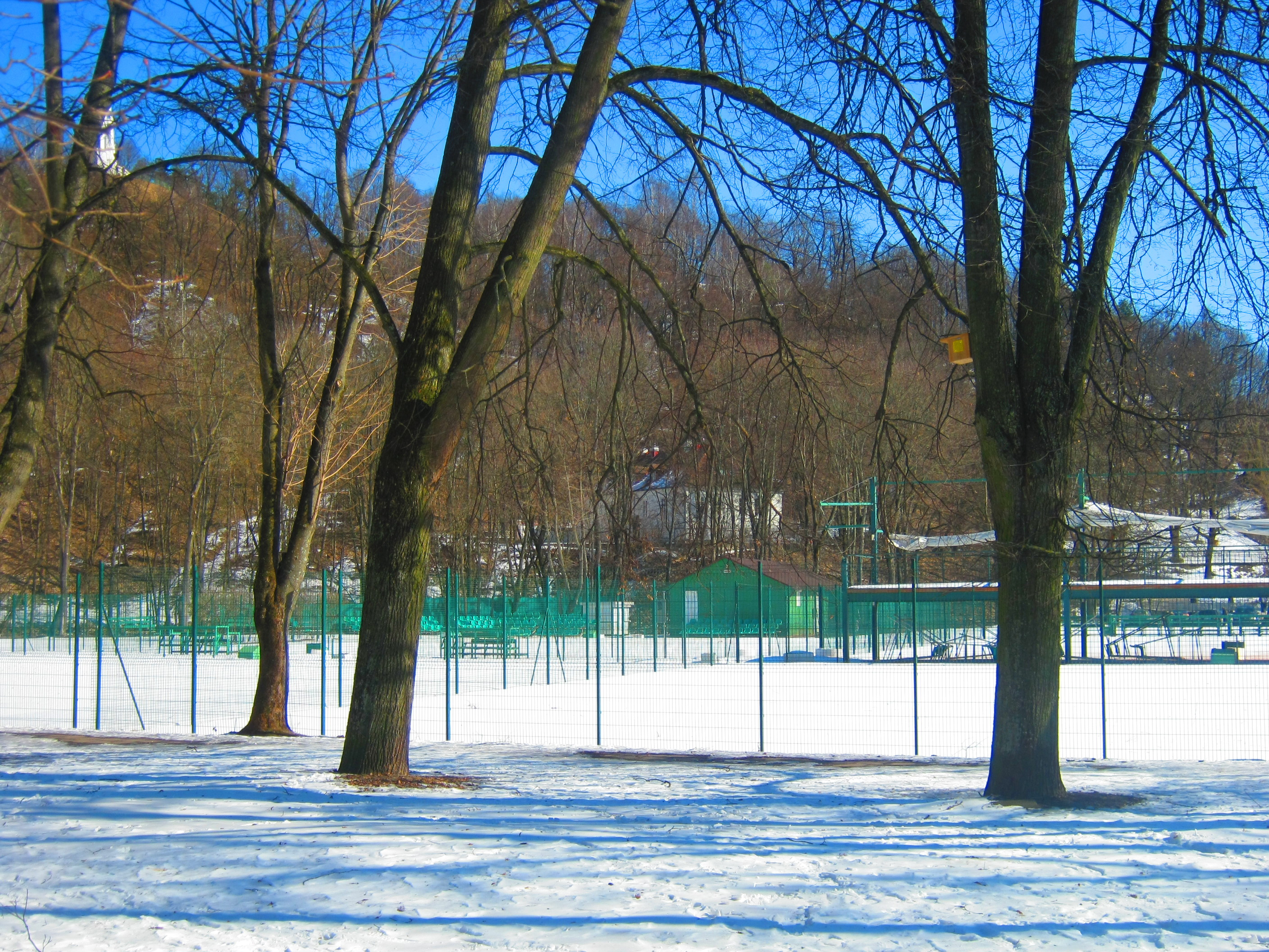 Sereikiškių parko teniso aikštynas